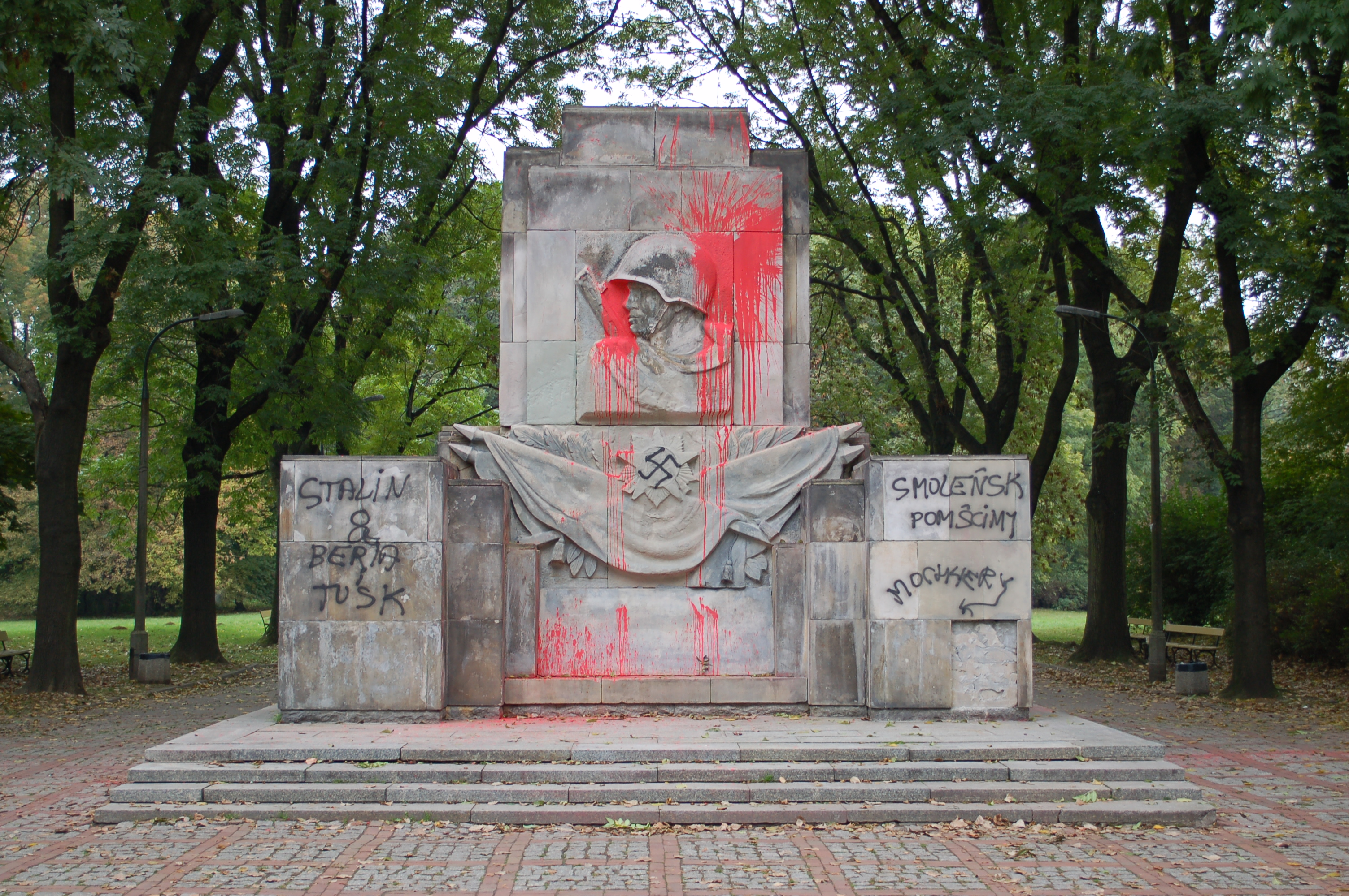 Warsaw: Park Skaryszewski im. Ignacego Jana Paderewskiego